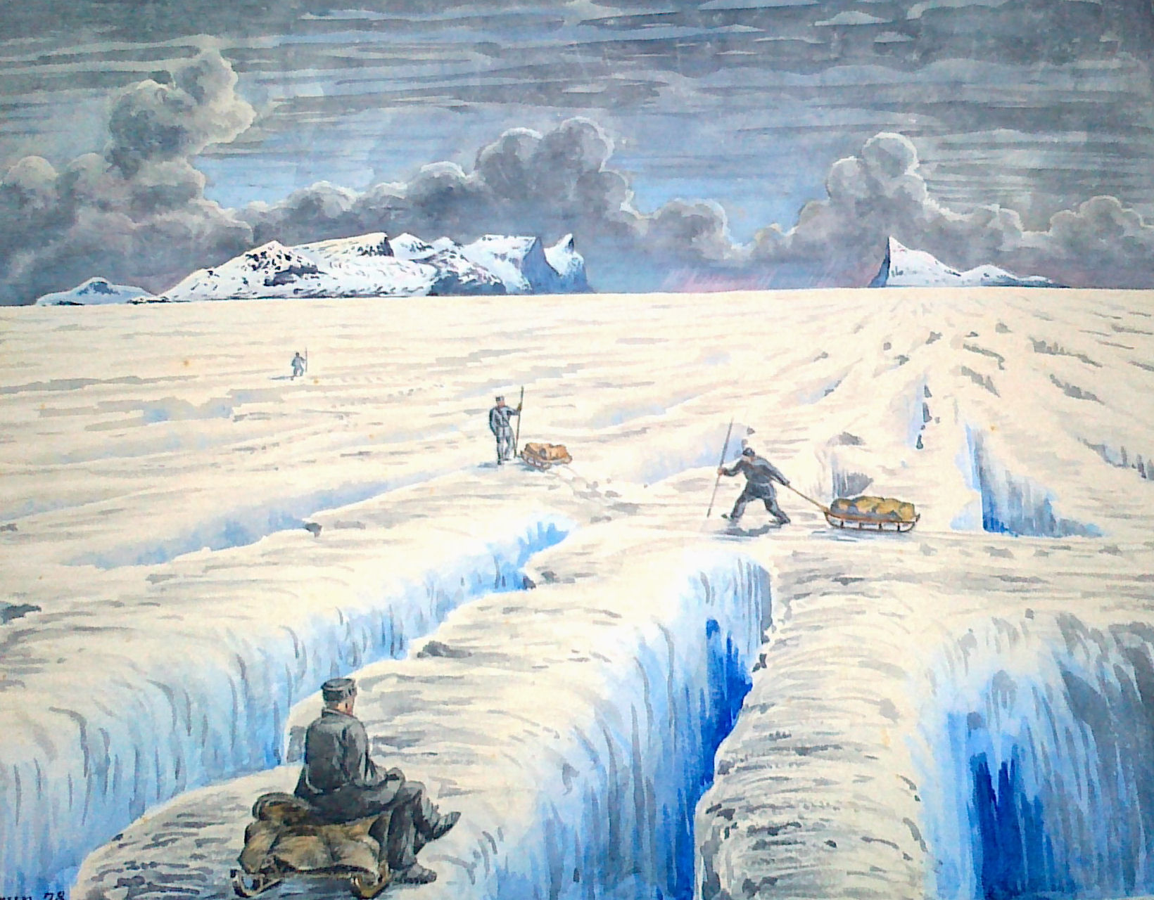 Tegning af Andreas Kornerup, 1878.